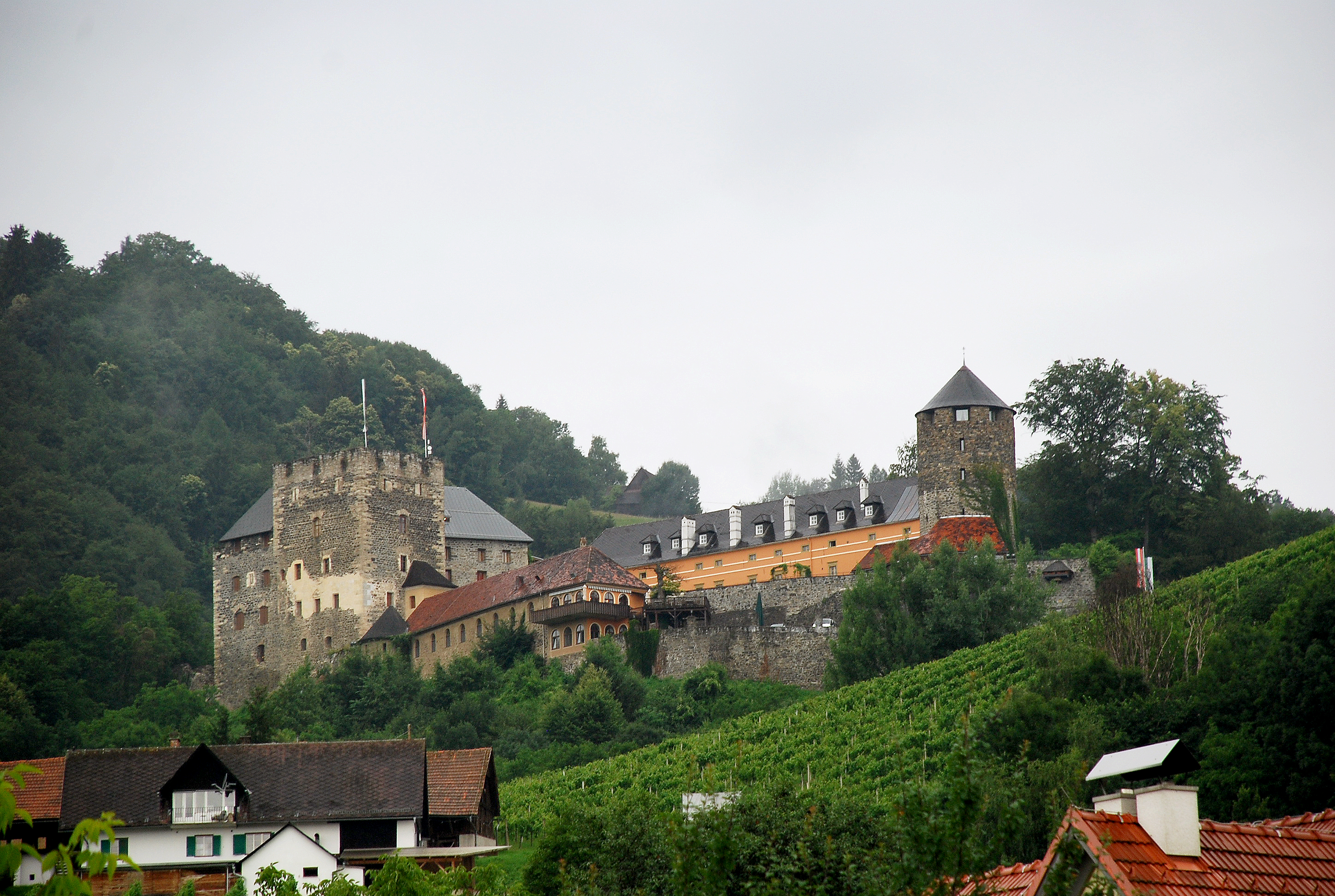 Deutschlandsberg, Steiermark, Österreich: Burg Deutschlandsberg über den Gärten